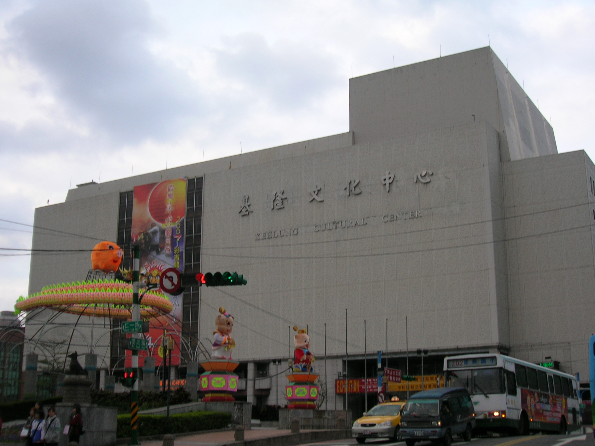 中文（台灣）: 基隆文化中心正面與富狗橋。